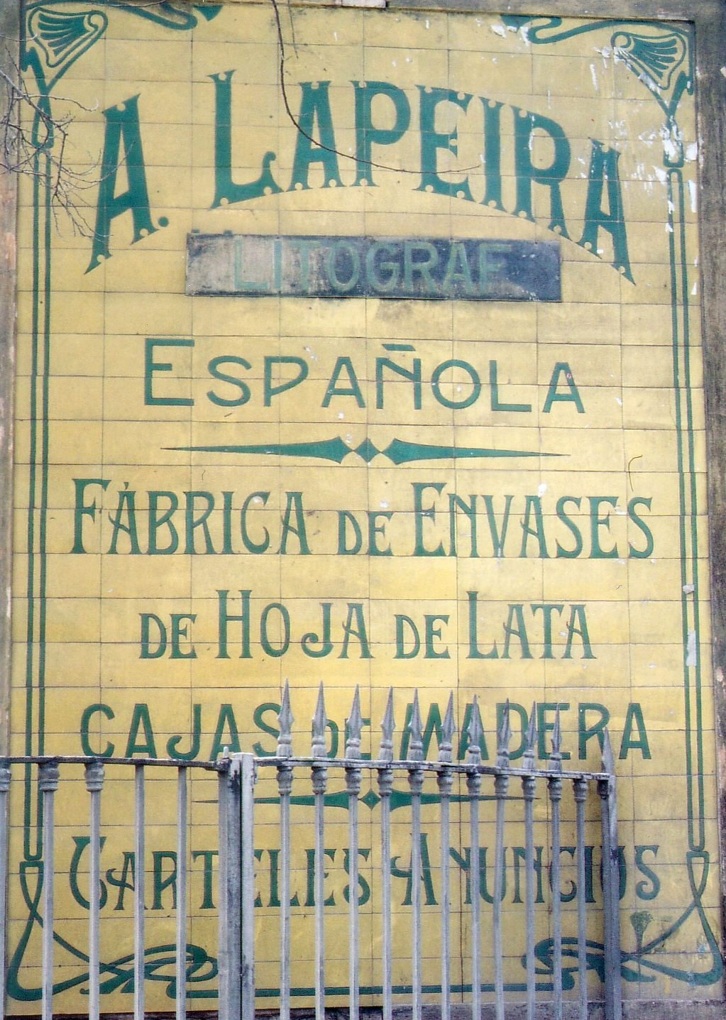 Cartel a la entrada de la fábrica publicitando los servicios.